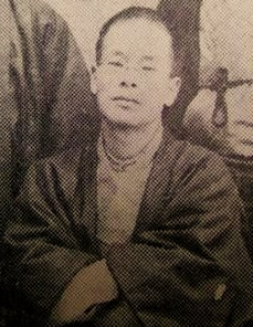 D.T. Suzuki (1870-1966) da giovane.